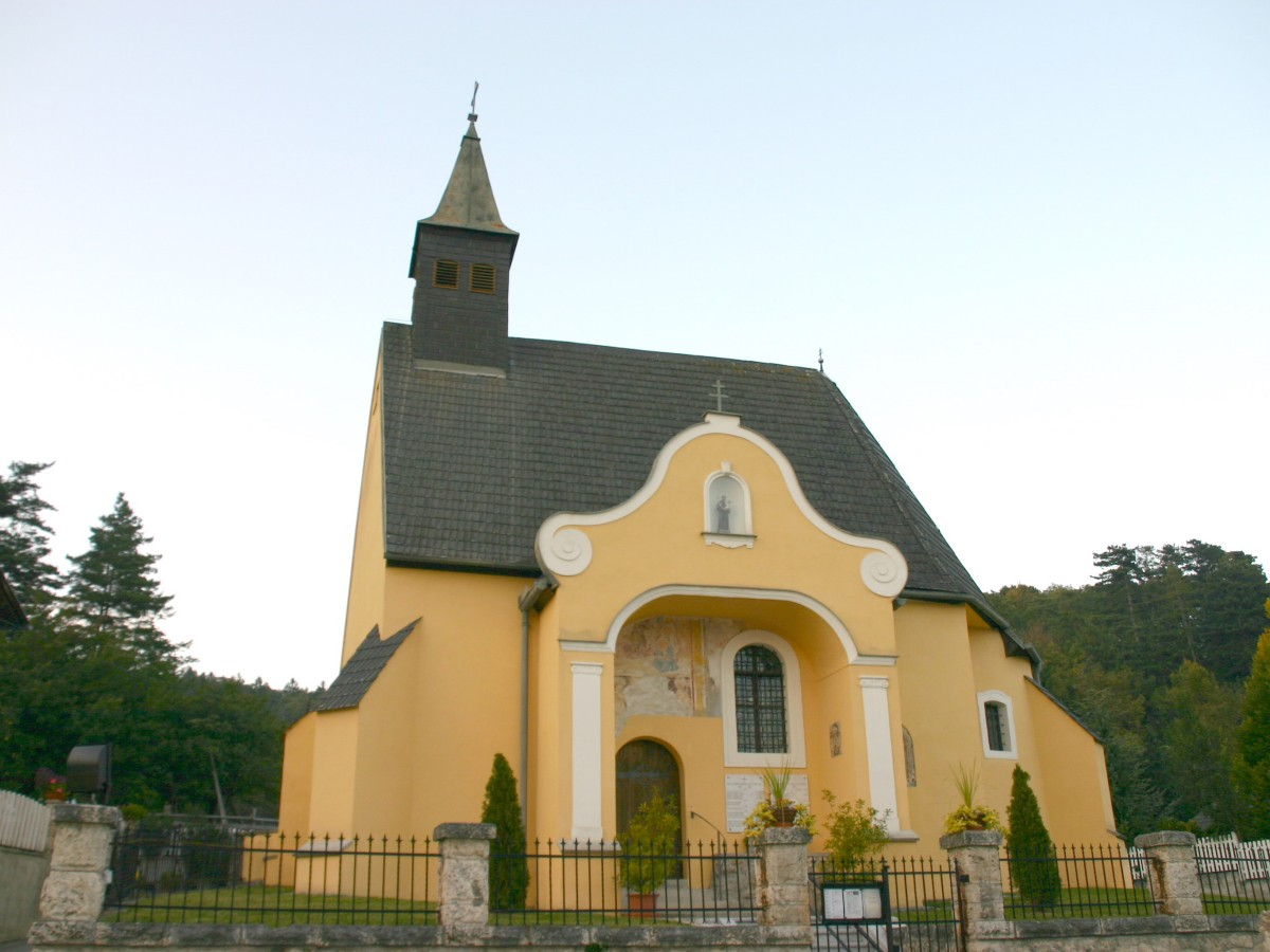 Pitten Kirche der Katastralgemeinde Sautern